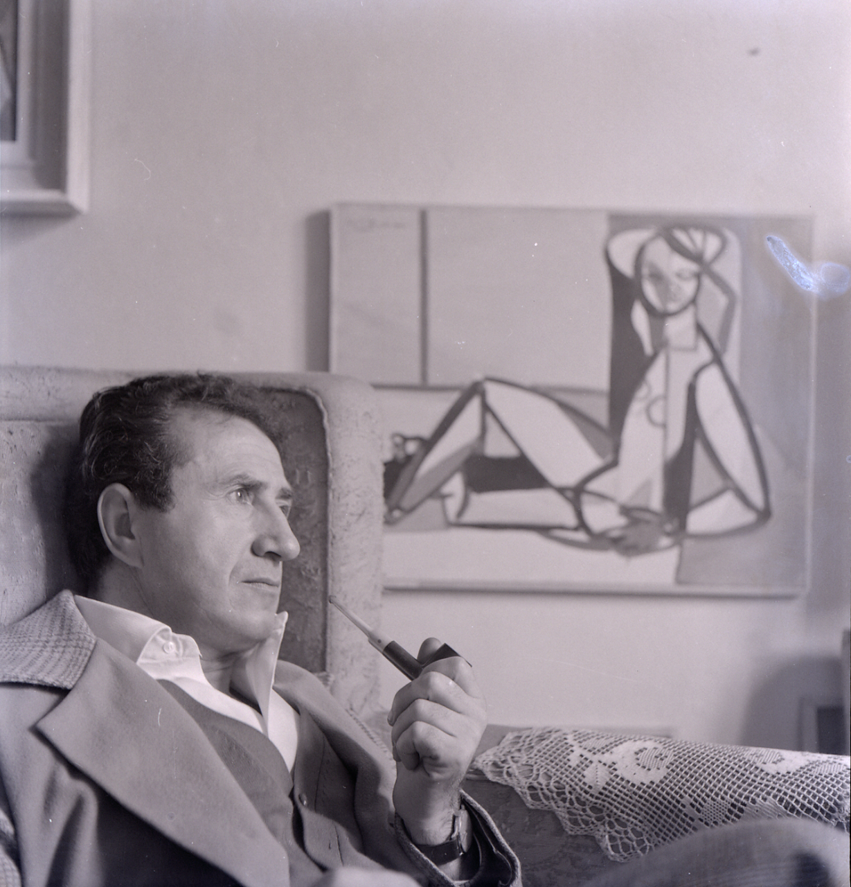 Servizio fotografico : Italia, 1961 / Paolo Monti. - Buste: 11, Fototipi: 11 : Negativo b/n, gelatina bromuro d'argento/ pellicola ; 6x6. - ((Serie costituita da 11 buste di carta identificate con i nn.: R4362, R4363, R4364, R4365, R4366, R4367, R4368, R4369, R4370, R4371, R4372. - Sulla busta R4362: "Kodra". - Occasione: Nel 1961 Kodra espose presso la libreria Feltrinelli di Milano con una mostra di di litografie. - Fonte: Rubrica di Paolo Monti: Archivio fino 1-4-1961/ 31-3-1963 (1961-1963), presso Archivio Paolo Monti